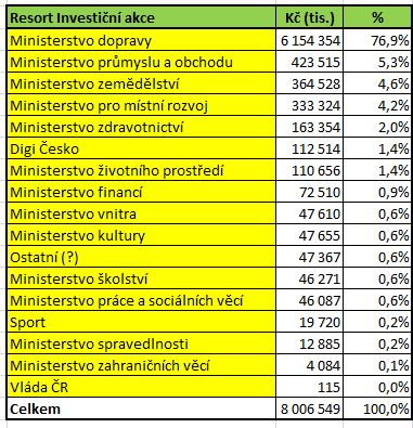 Udělal jsem sám tabulku z NIP = ručně přepsal a hlavně upravil - takže je to moje vlastní dílo.